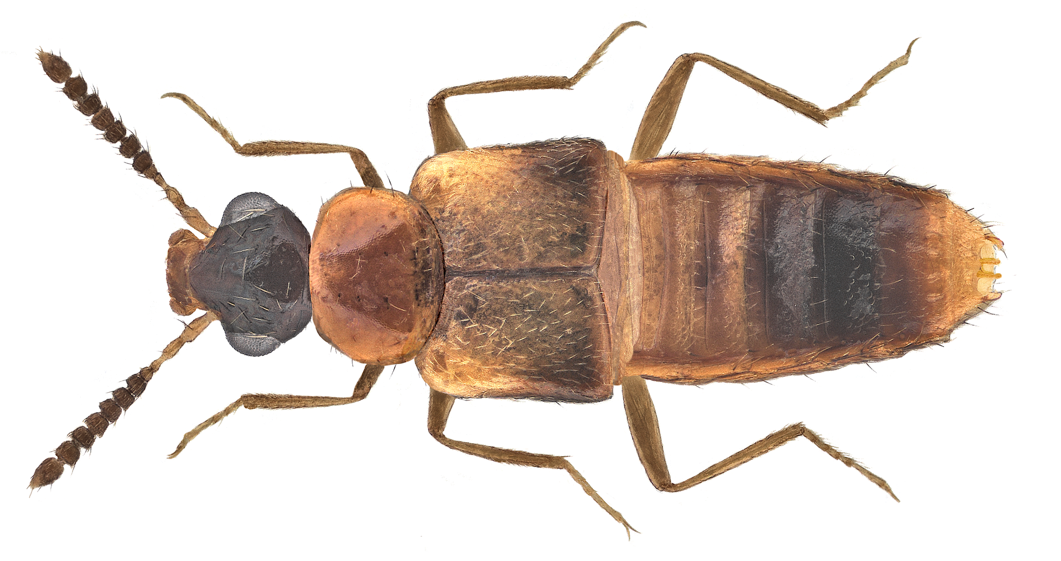 Gyrophaena munsteri Family: Staphylinidae Size: 2 to 2.4 mm Origin: Europe Ecology: on cap fungus Location: Austria, Kärnten, Kleinkirchheim, 1000 m U.Schmidt leg, 19.VI.1981; det. U.Schmidt, 2012 Photo: U.Schmidt, 2012